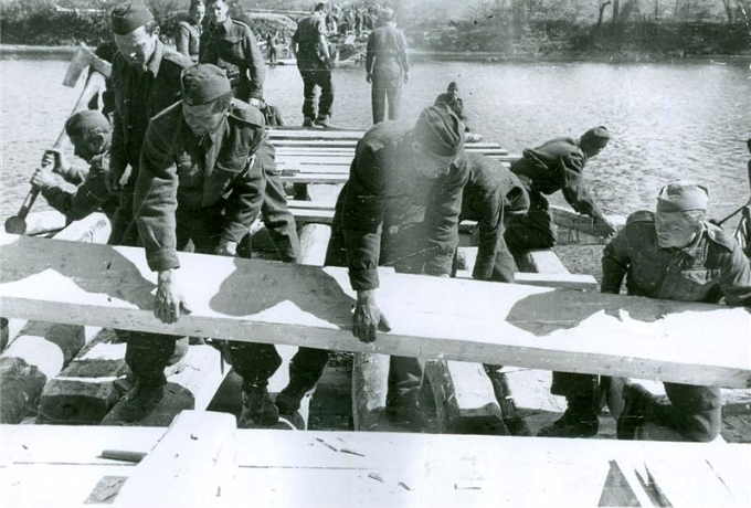 V. prekomorska brigada gradi most čez Kolpo pri Vinici.